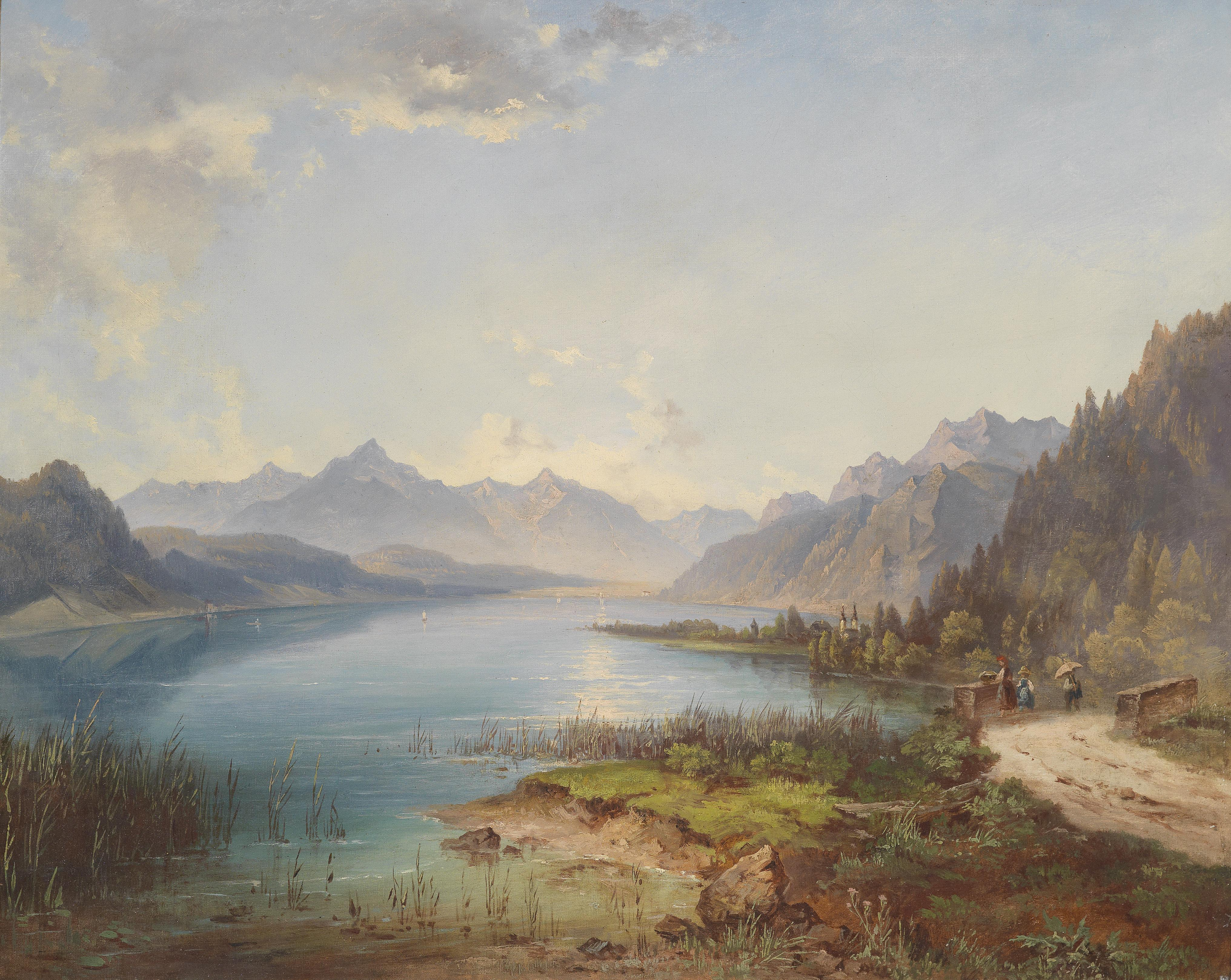 Partie am Millstätter See. Ansicht etwa von Pesenthein Richtung Westen, wo die Kirchtürme von Millstatt erkennbar sind. Die Brücke im Vordergrund führt über den Lammersdorfer Leitenbach, der von der Millstätter Alpe in den See fließt.label QS:Lde,"Partie am Millstätter See. Ansicht etwa von Pesenthein Richtung Westen, wo die Kirchtürme von Millstatt erkennbar sind. Die Brücke im Vordergrund führt über den Lammersdorfer Leitenbach, der von der Millstätter Alpe in den See fließt."